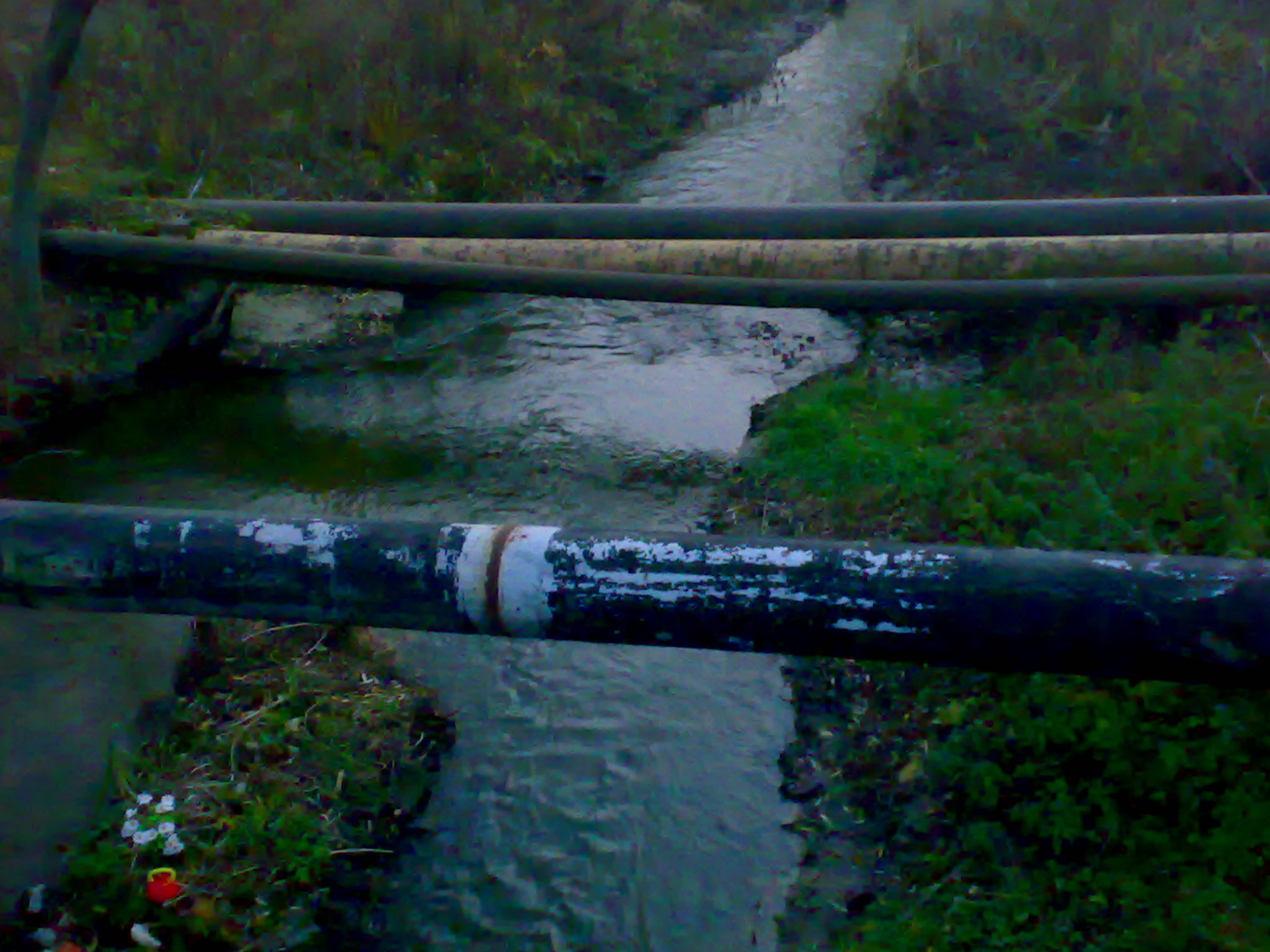 Міські комунікації через річку Протока у Білій Церкві